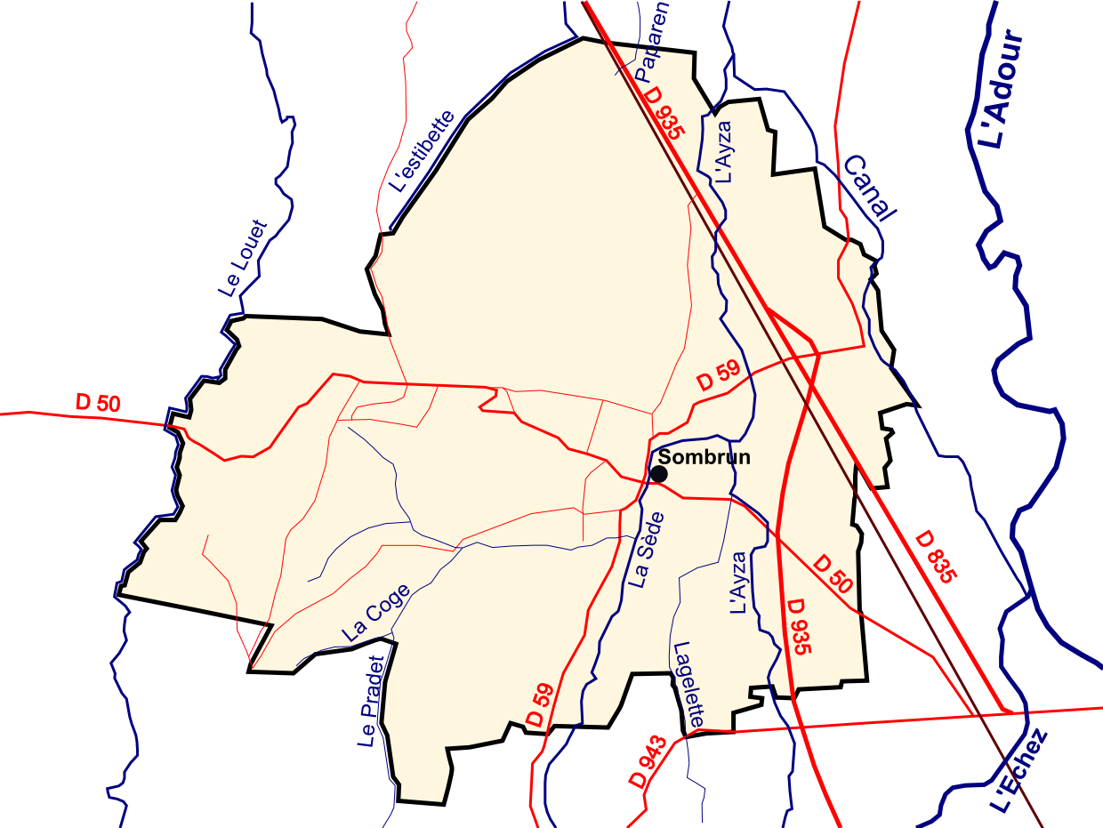 Carte de Sombrun, routes et rivières, commune de Sombrun, Hautes-Pyrénées, France.